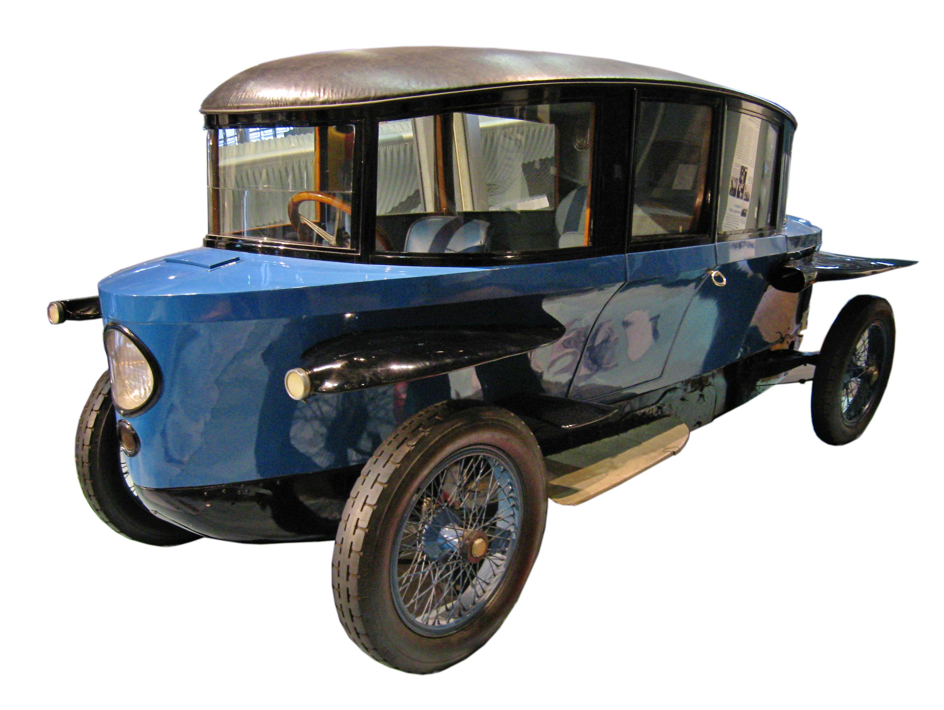 Rumpler-Tropfenwagen German Museum of Technology Native nameDeutsches Technikmuseum BerlinLocationBerlinCoordinates52° 29′ 55″ N, 13° 22′ 39″ E Established1983Web page control : Q706530 VIAF: 150642200 ISNI: 0000 0001 0121 6426 LCCN: n97103087 GND: 2162237-1 SUDOC: 075899728 WorldCat institution QS:P195,Q706530